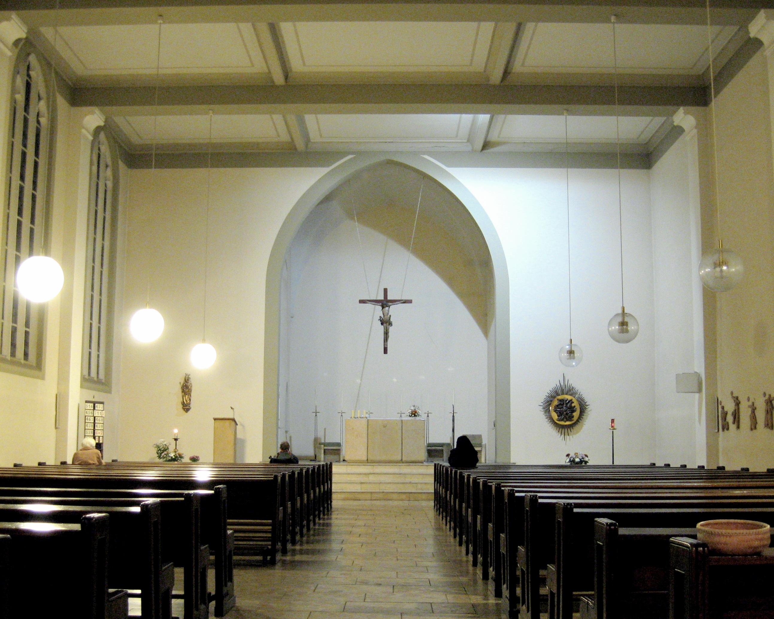 Konventskirche des Sankt-Josefsheimes in Berlin